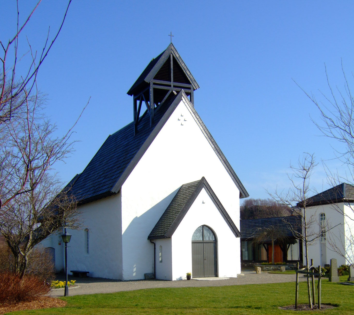 Ogna kirke Rogaland Norway